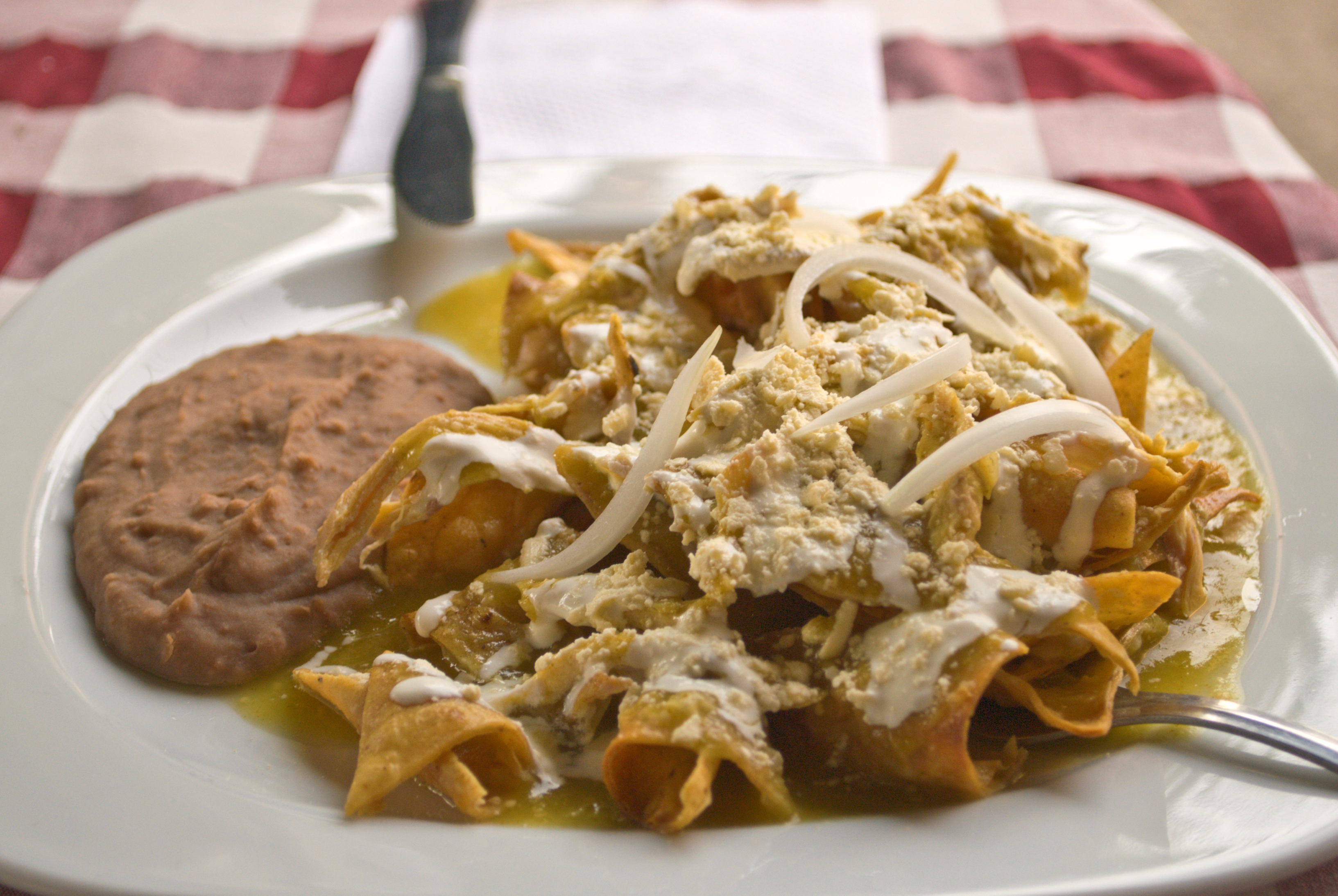 Narvarte, Ciudad de México